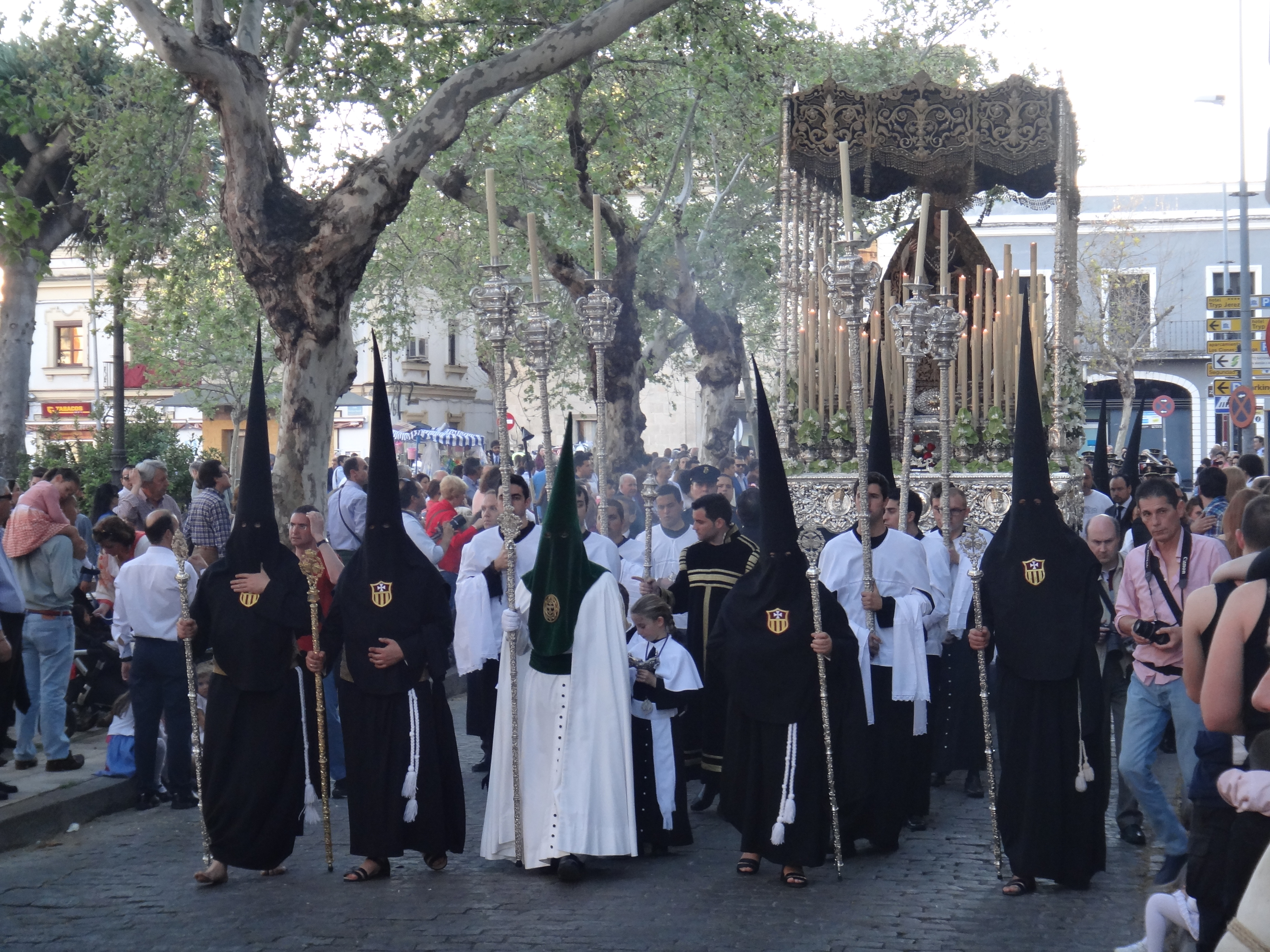 Las Tres Caídas. Semana Santa de Jerez de la Frontera 2015 (Andalucía, España)